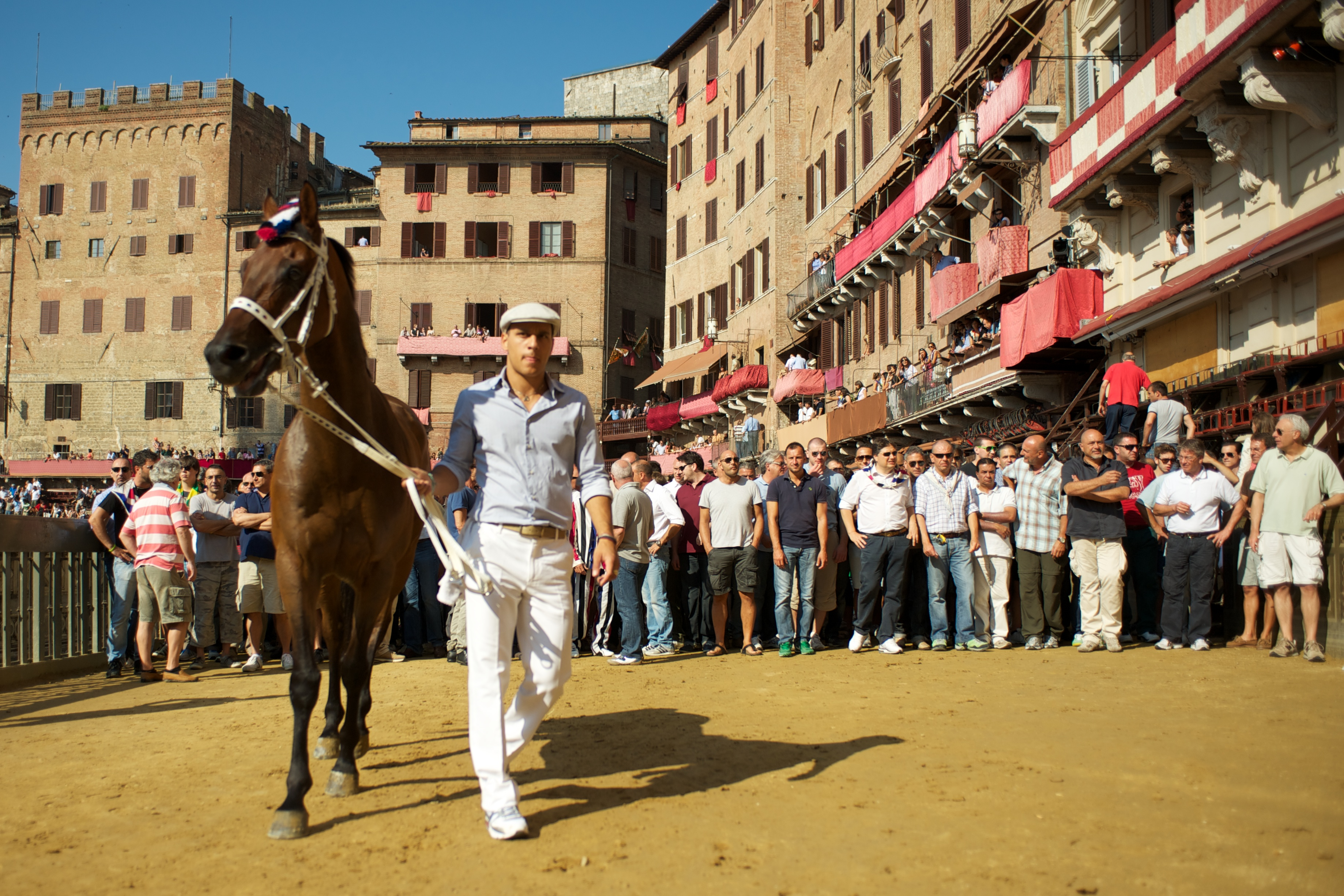 Dopo la prova Moedi si avvia per tornare nella contrada dell'Istrice.